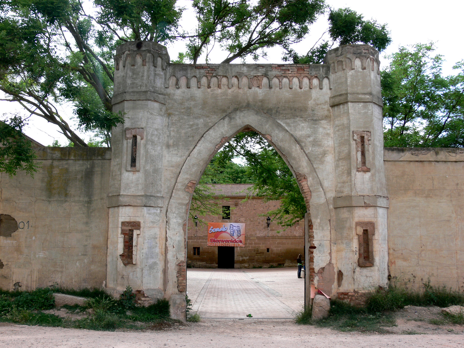 Somalo, despoblado del municipio de Uruñuela (La Rioja, España)